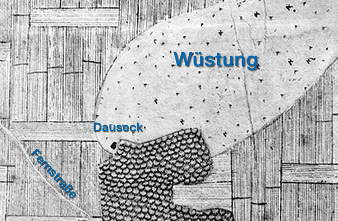 Wüstung und Gebäude(relikt) beim Burgstall Dauseck (Markgröningen). Genordeter Ausschnitt aus der Forstkarte 158 (Enzweihingen) von Andreas Kieser (1682)